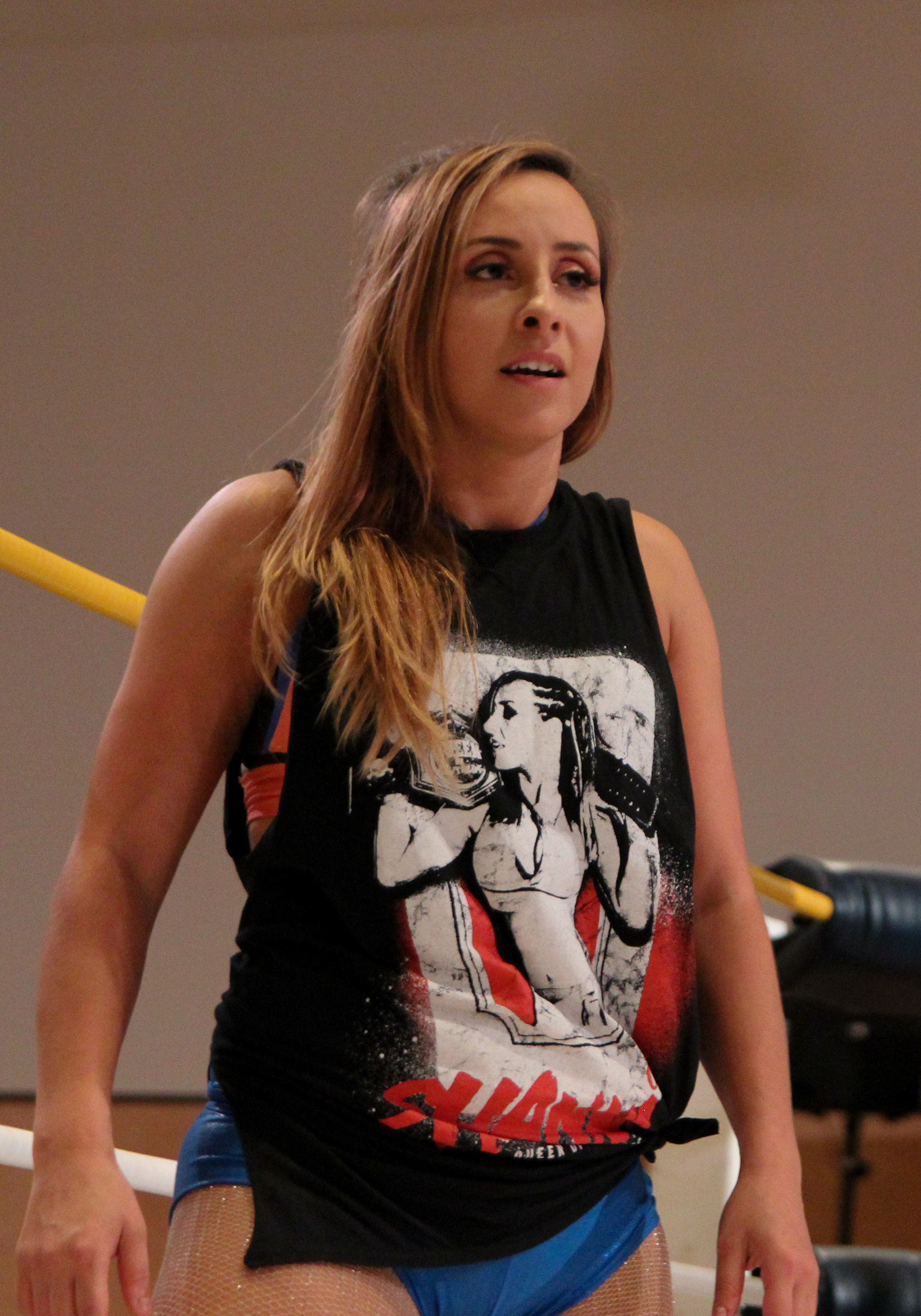 La catcheuse Shanna en 2019